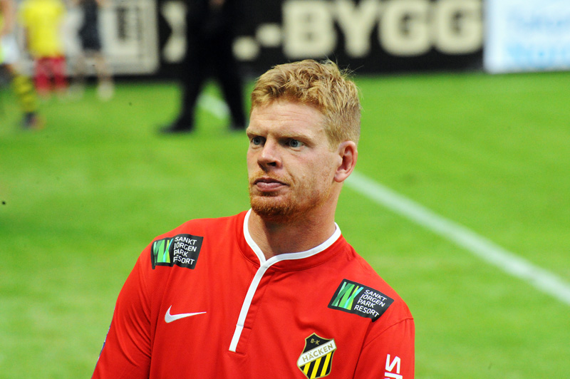 Christoffer Källqvist